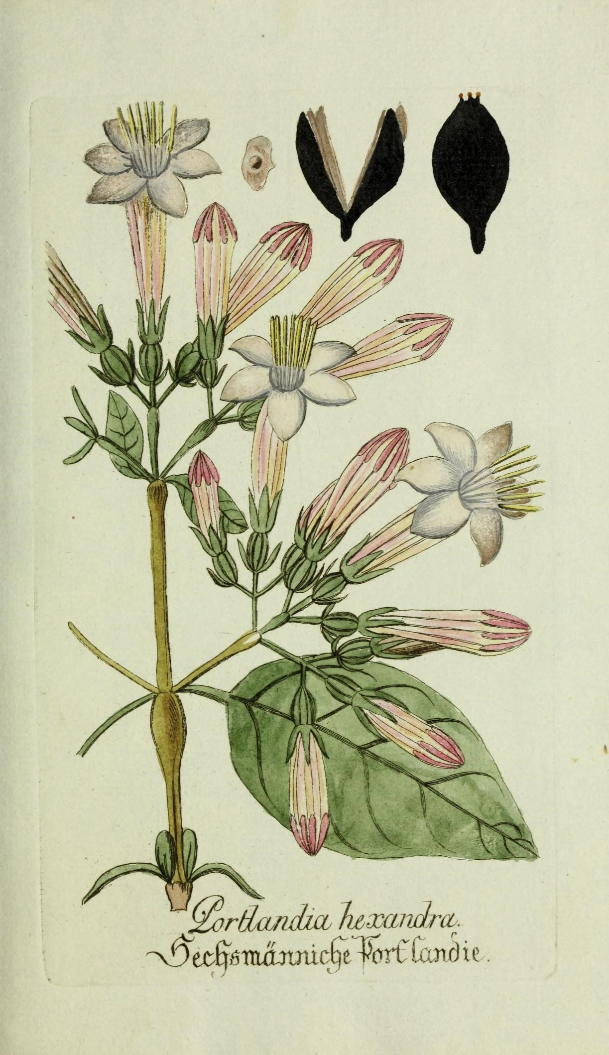 Plantarum indigenarum et exoticarum icones ad vivum coloratae, oder, Sammlung nach der Natur gemalter Abbildungen inn- und ausländlischer Pflanzen, für Liebhaber und Beflissene der Botanik /